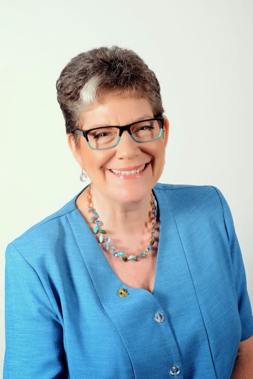 Naomi Tsur - Deputy Mayor of Jerusalem